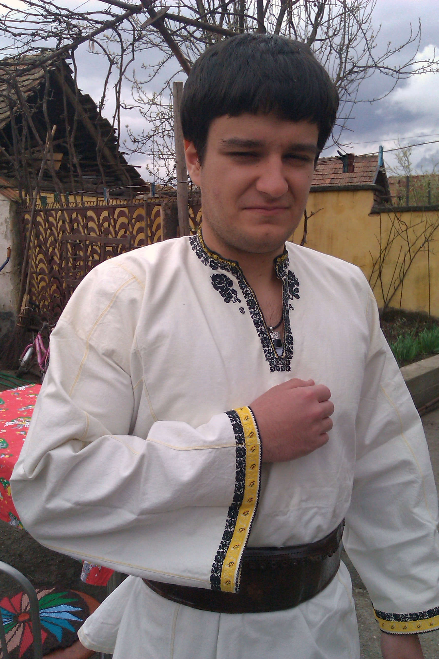 Camaşă tradiţională Racoviţa, Sibiu. Se poate observa şerparul, beata şi puişorii. Octavian Stoica (a lu' Ovidiu'Viorelu'Onul Pascului).